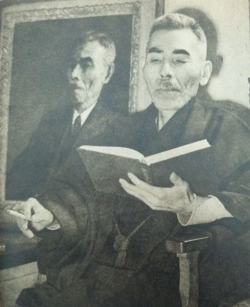 昇曙夢